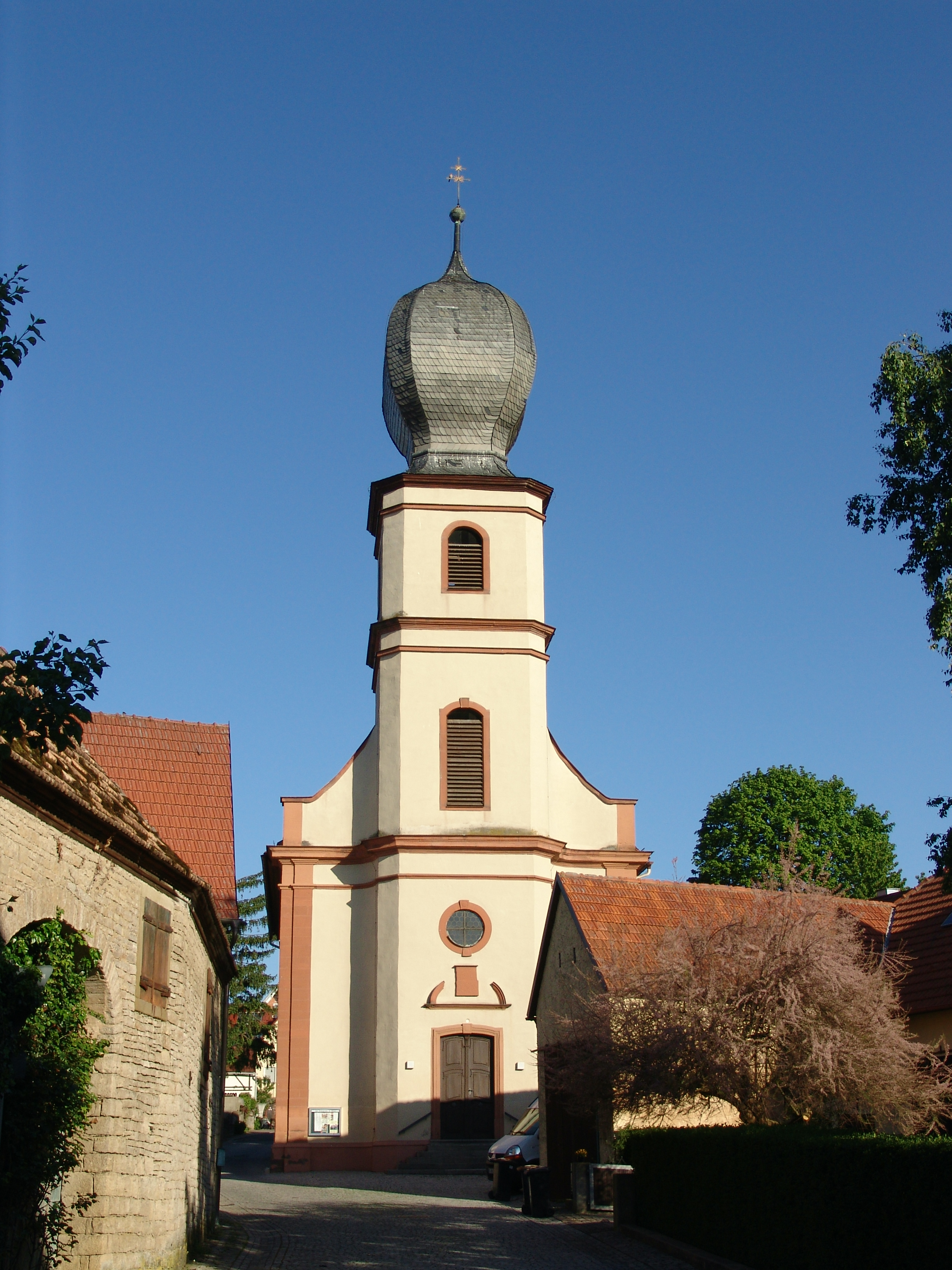 Neuses am Berg Kreuzgasse 6, kath. Kirche St. Nikolaus